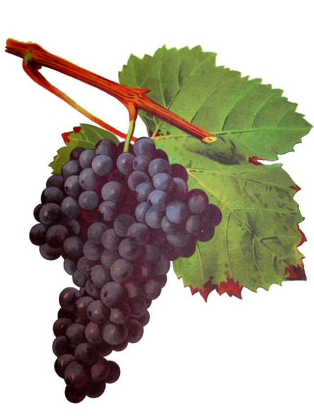 Grappe de Tannat par Viala et Vermorel